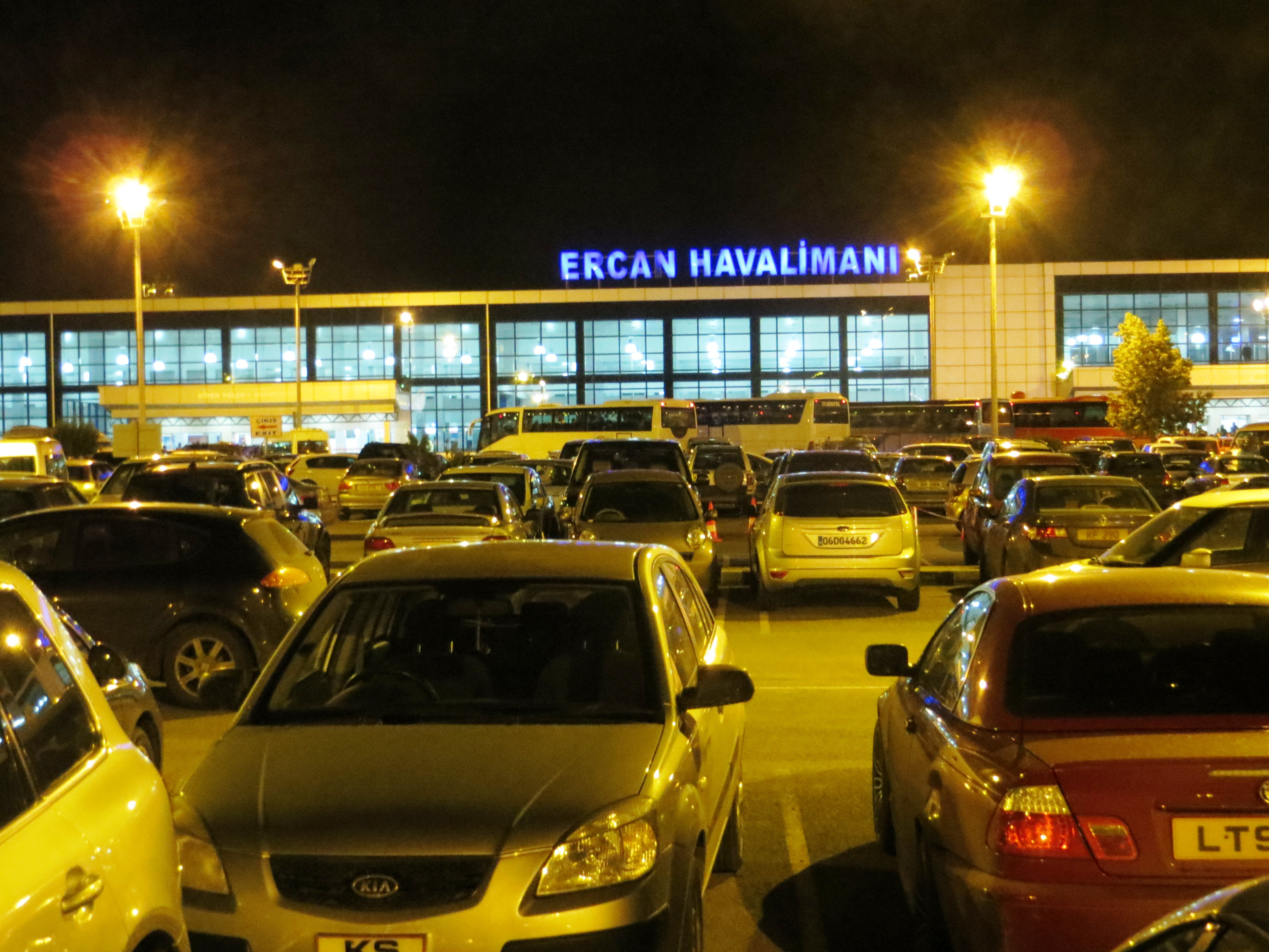 Luchthaven Ercan op Noord Cyprus